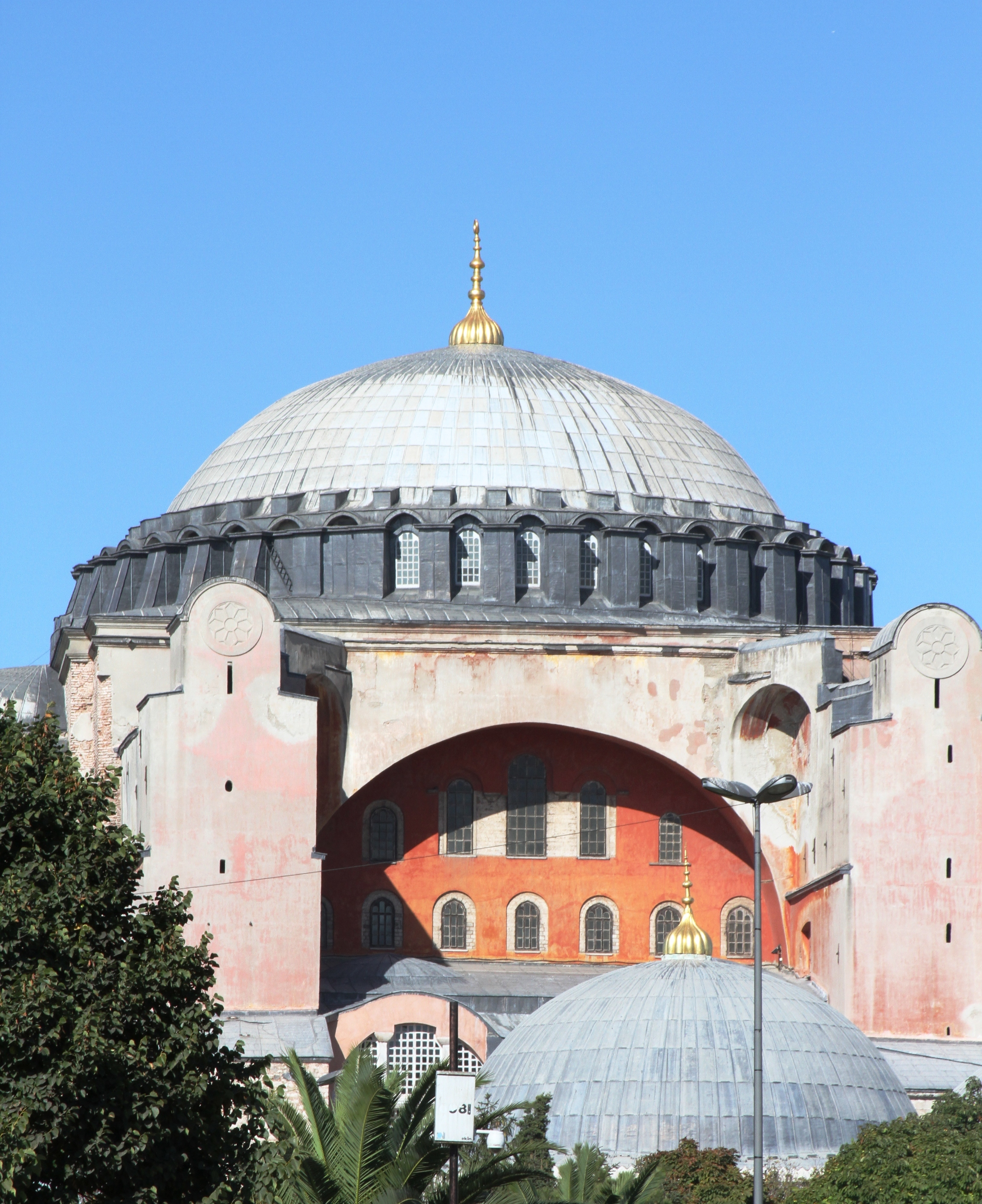 Vista frontal